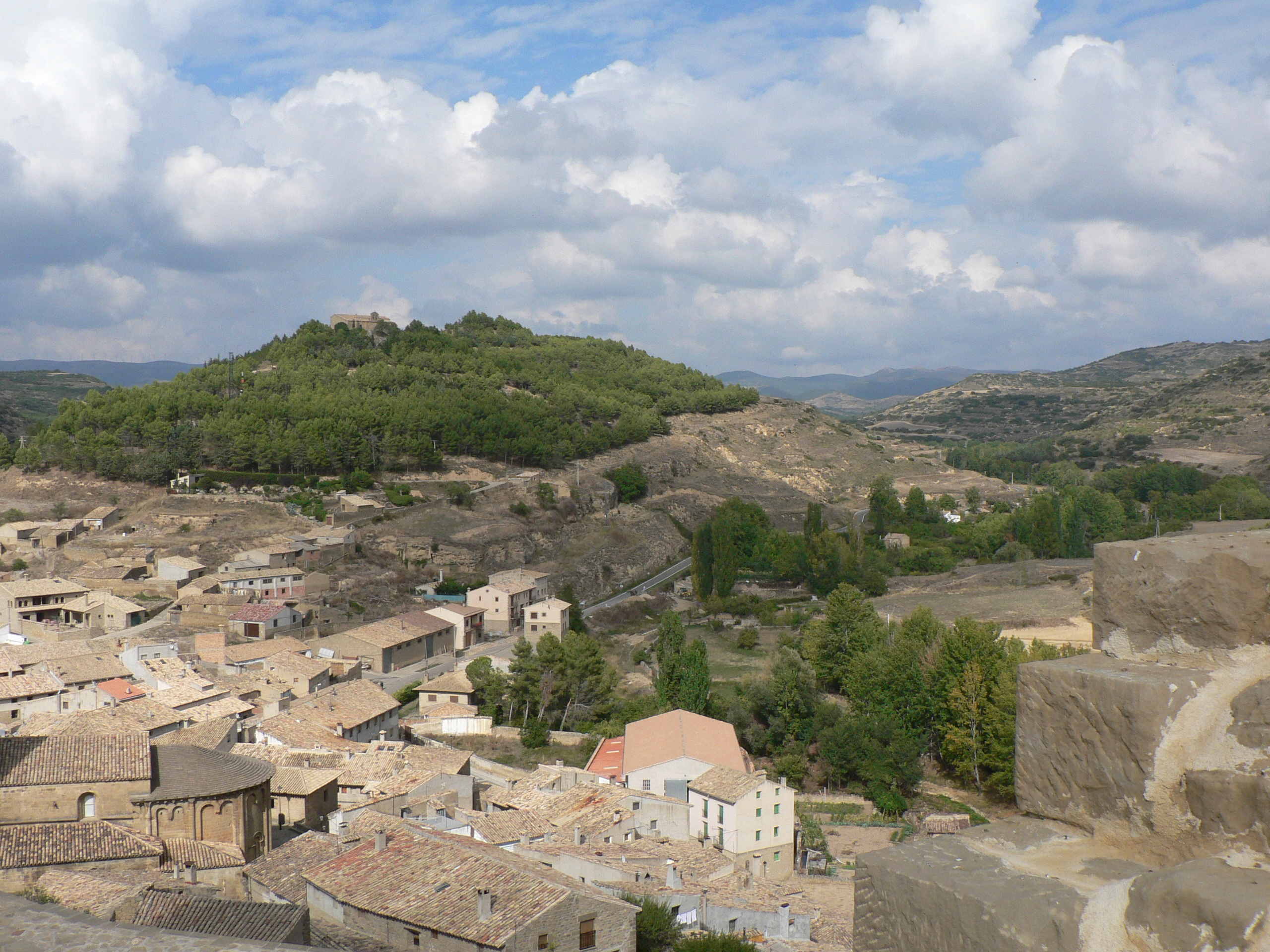 Uncastillo